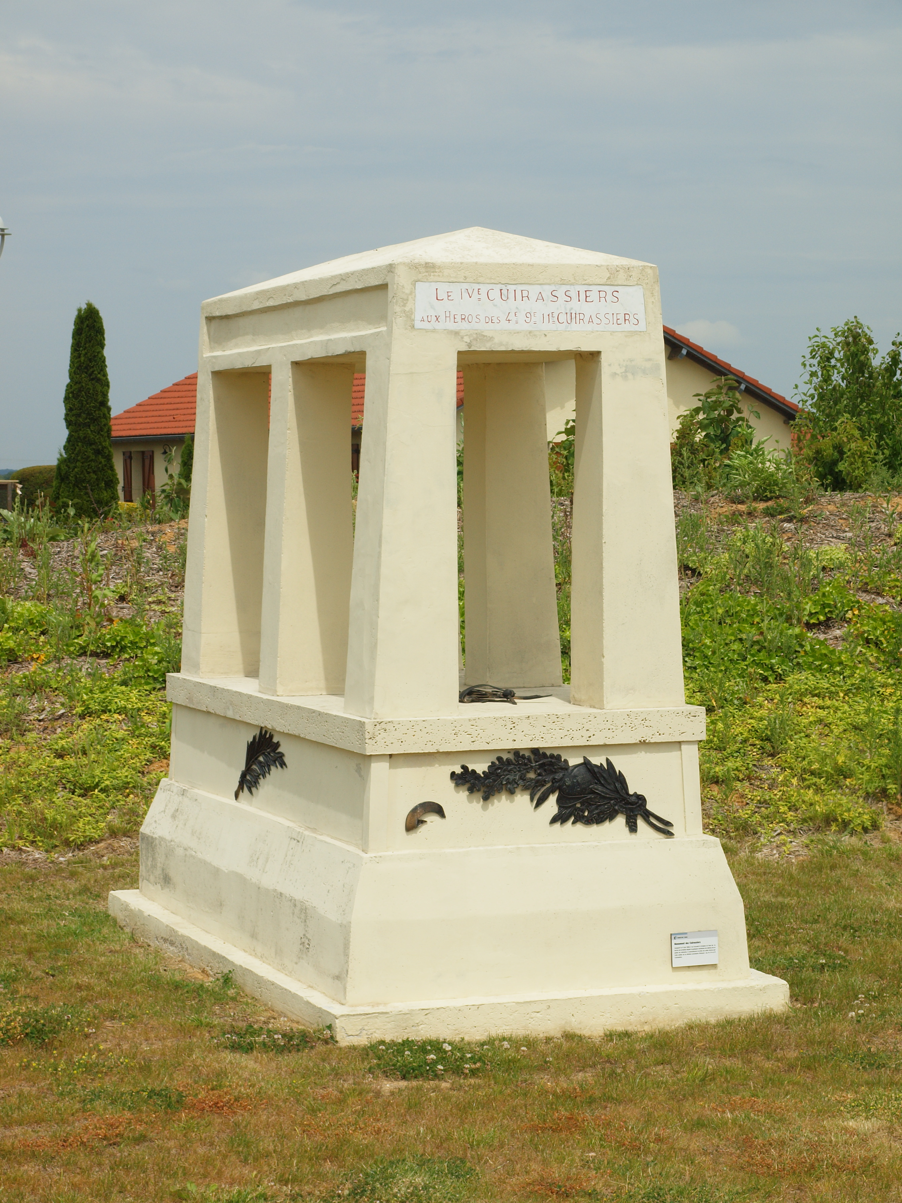 Jardin mémorial du Moulin de Laffaux (Aisne, France)